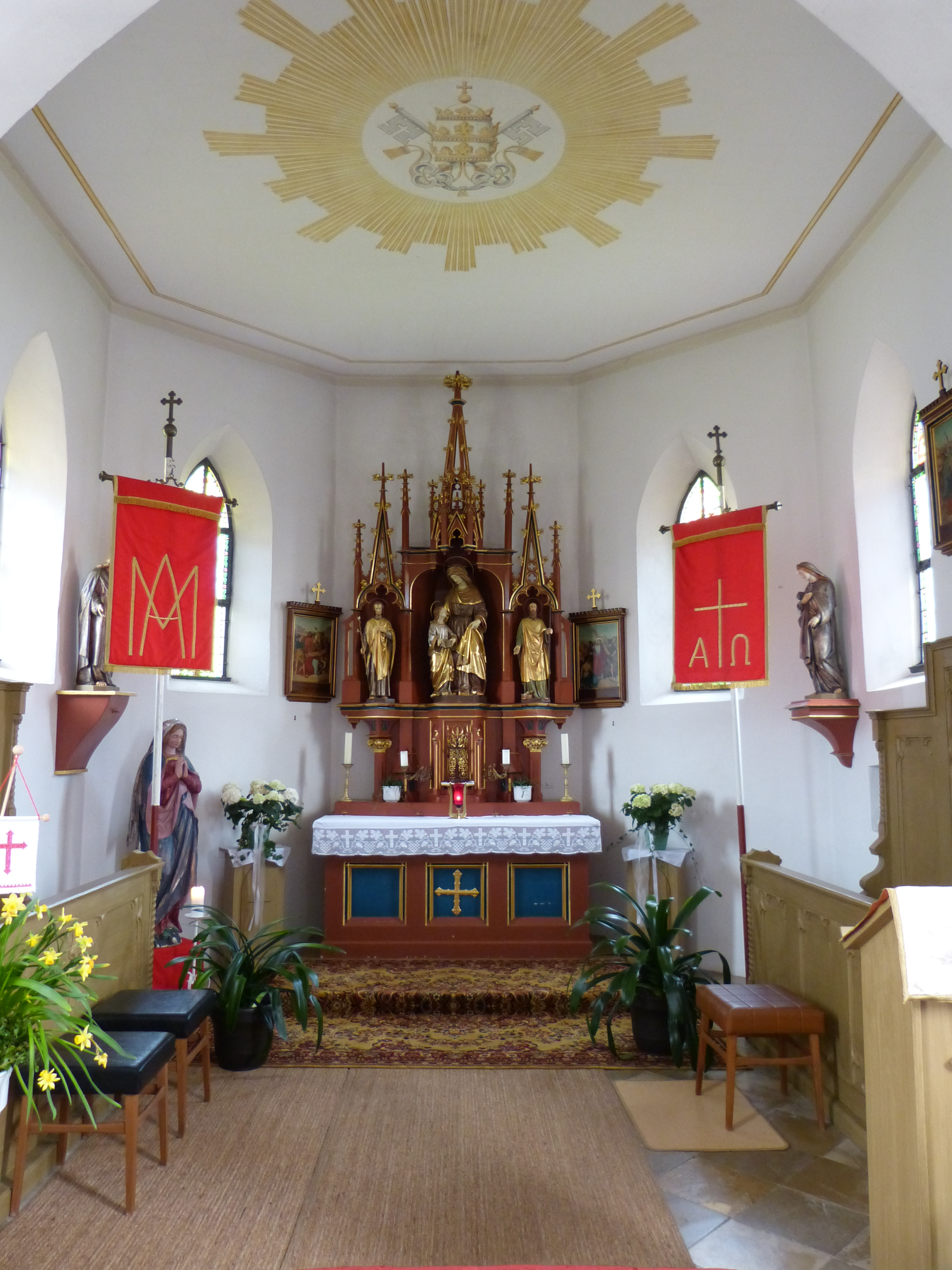 St. Anna, Weilbach, Gemeinde Pfaffenhausen, Landkreis Unterallgäu, Bayern